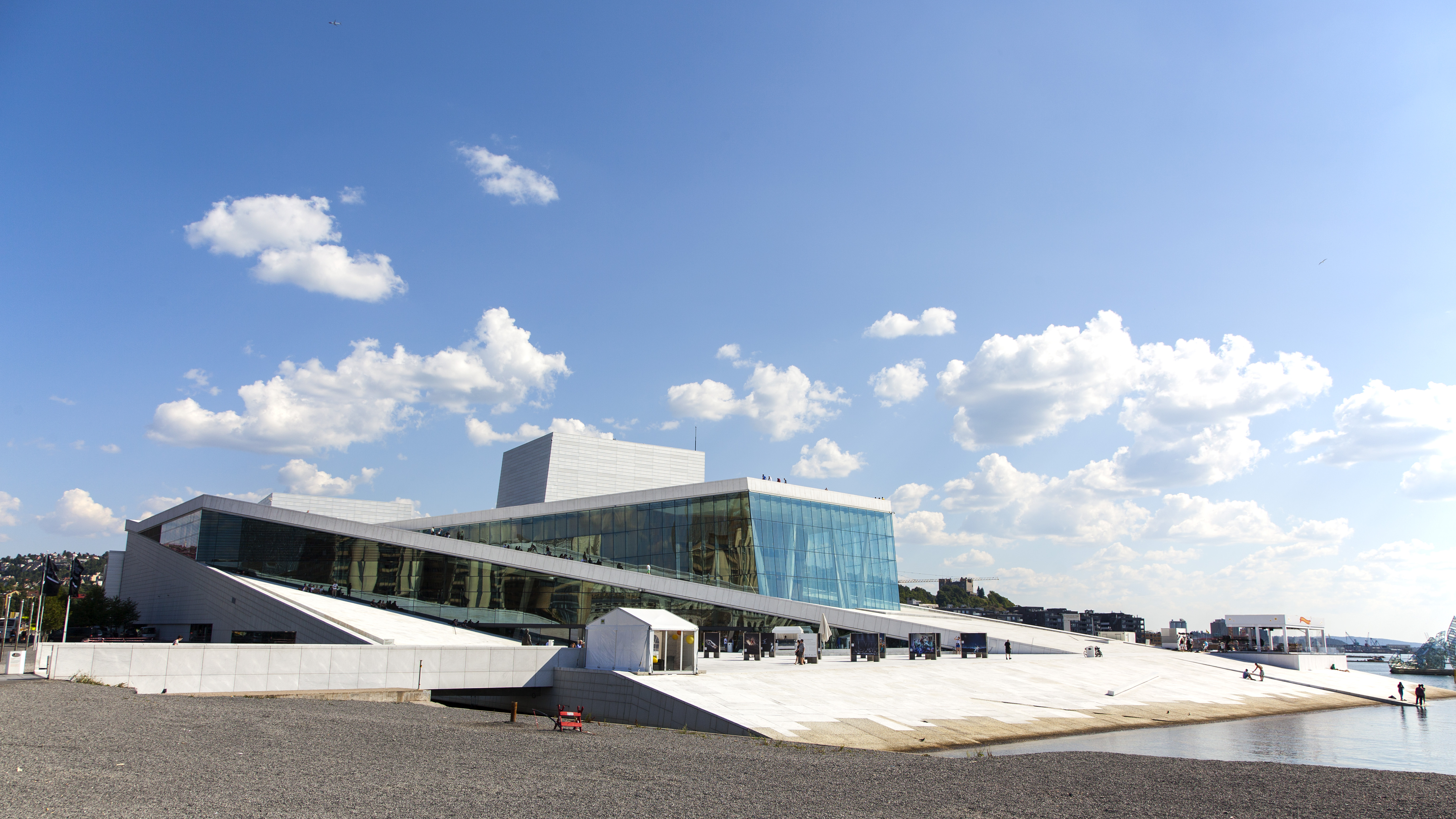 Operahuset i Oslo.